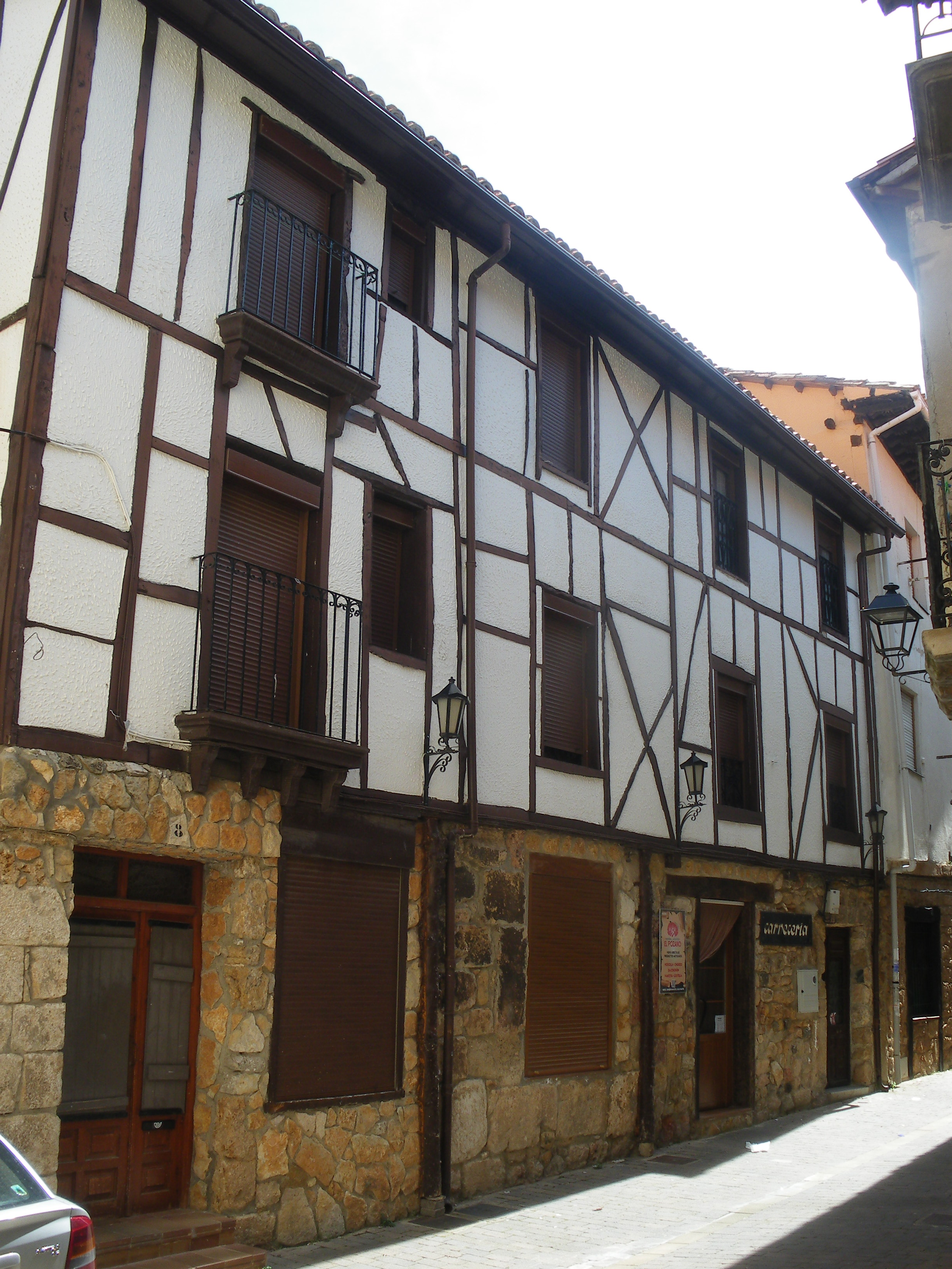 Poza de la Sal, provincia de Burgos, Castilla y León, España.